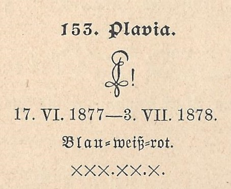 Überschrift der Mitgliederliste des Corps Plavia in den Kösener Korps-Listen 1910, S. 658